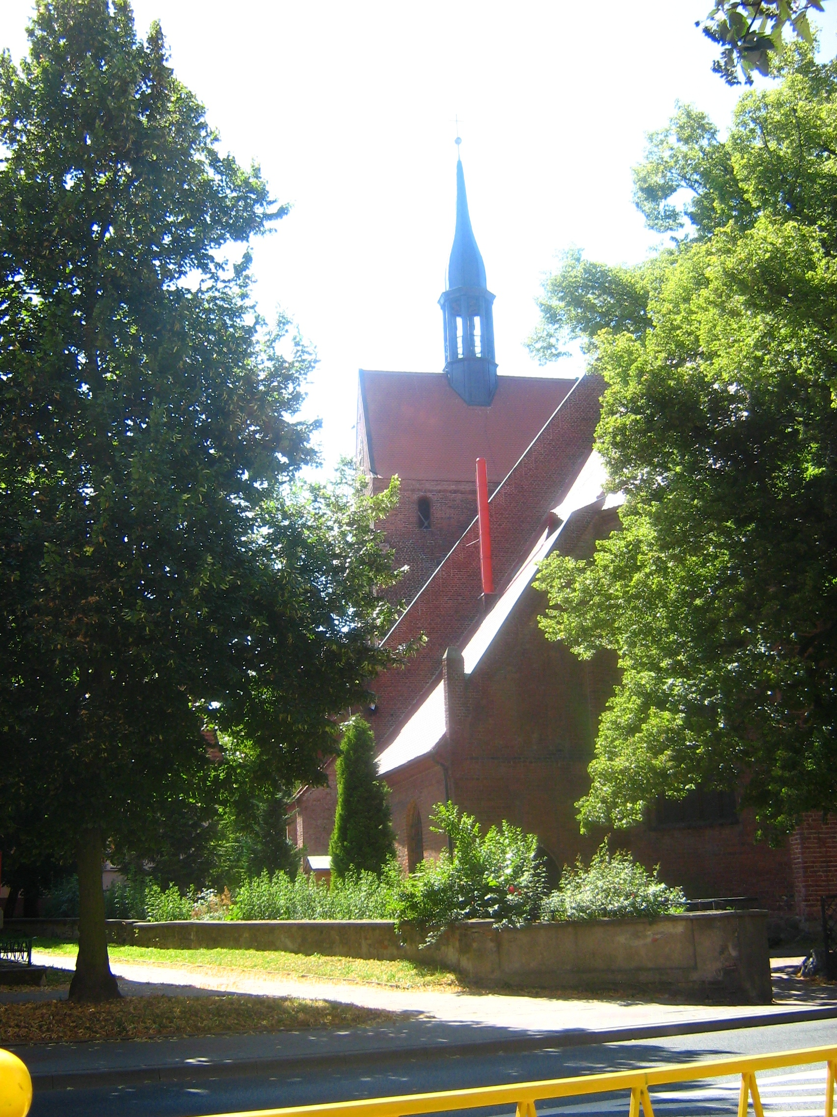 Kościół Wniebowzięcia NMP w Nowogardzie